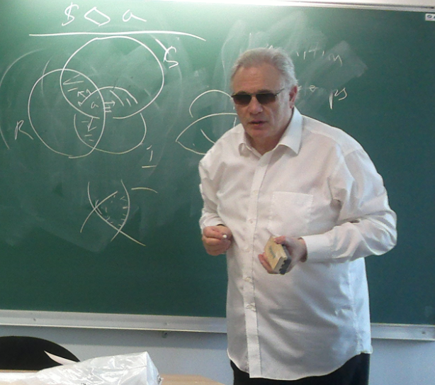 近期照